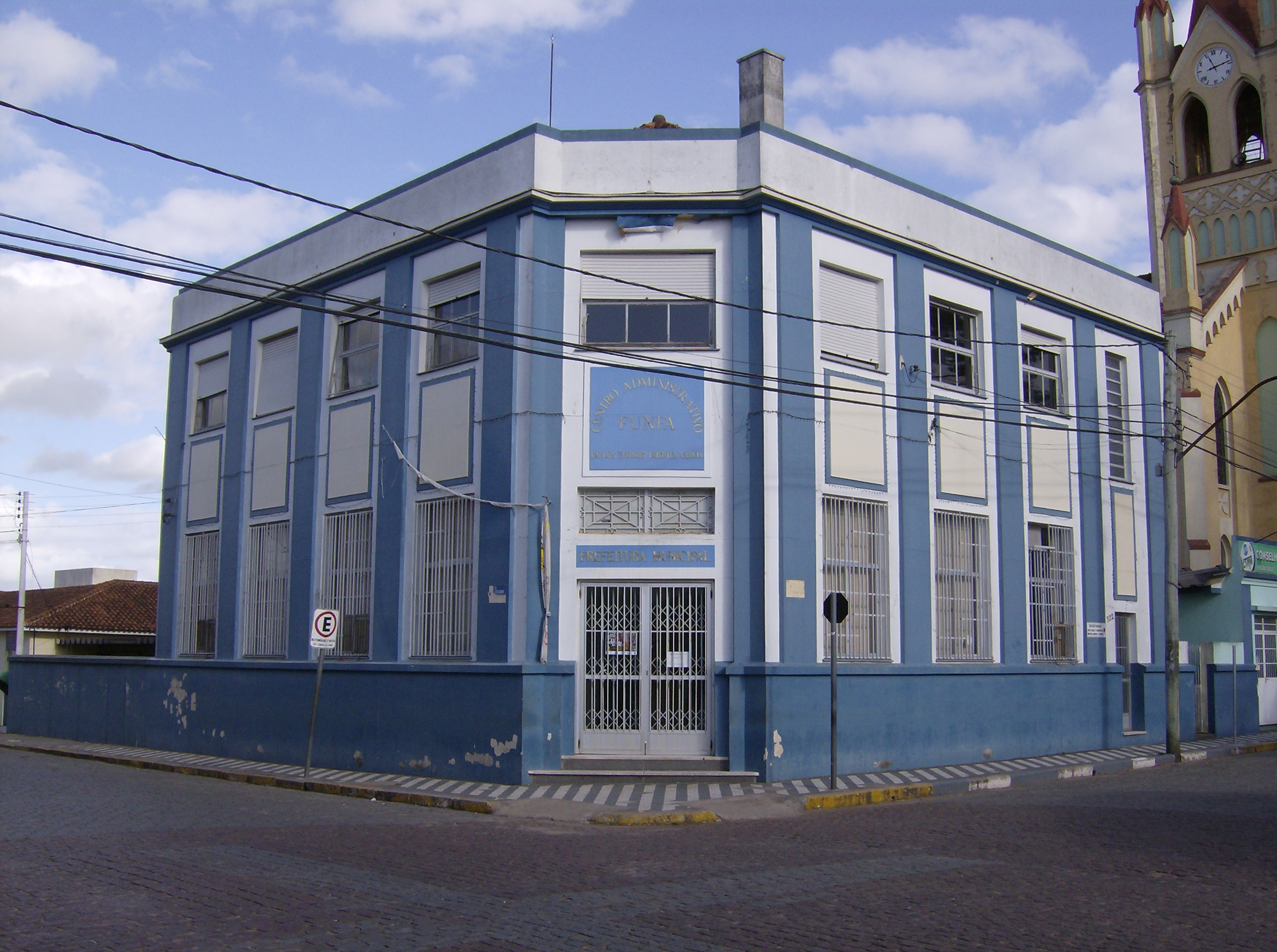 Pinheiro Machado (city hall), Rio Grande do Sul, Brazil